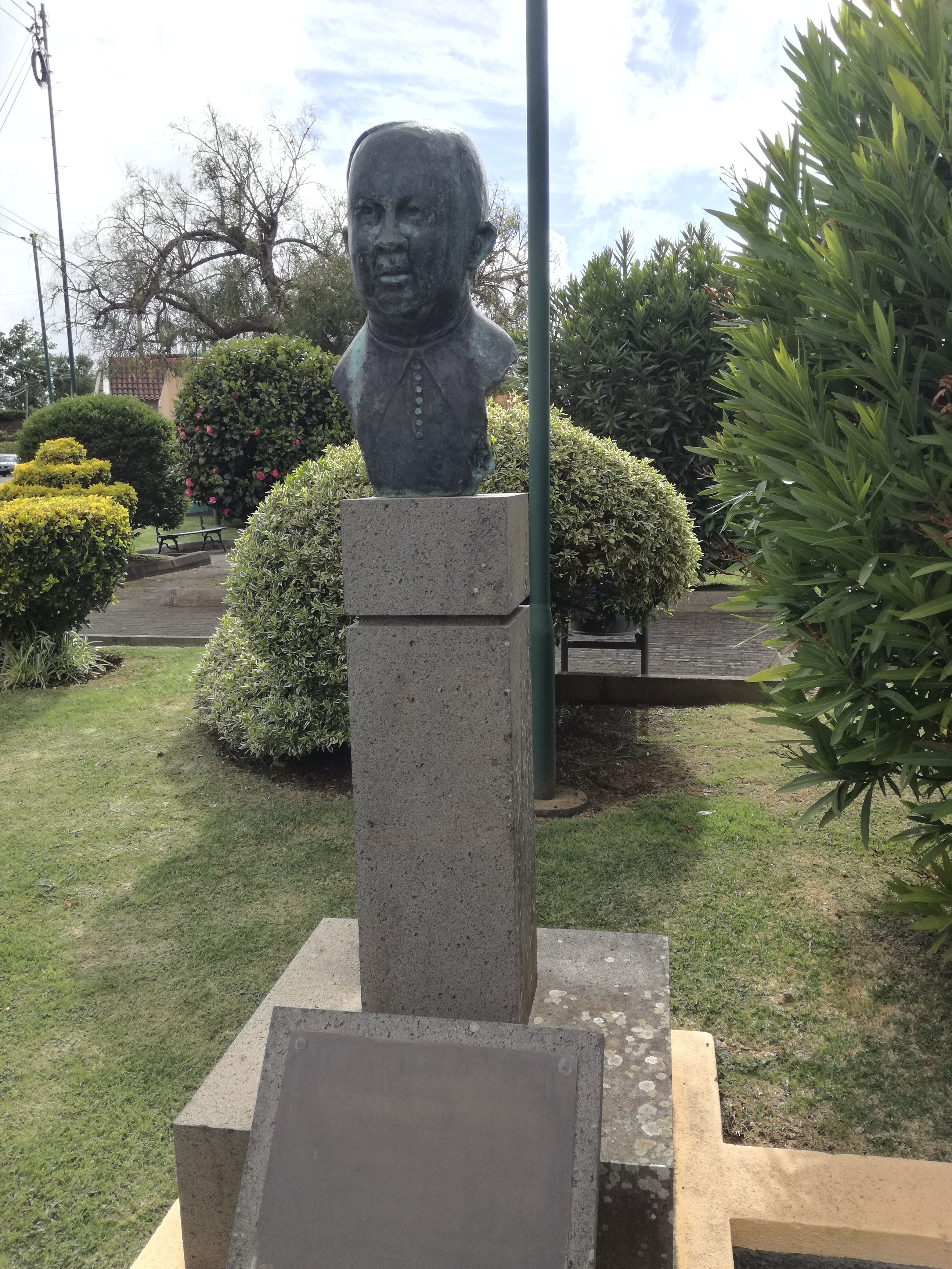 Foto do jardim do local onde a estátua está localizada